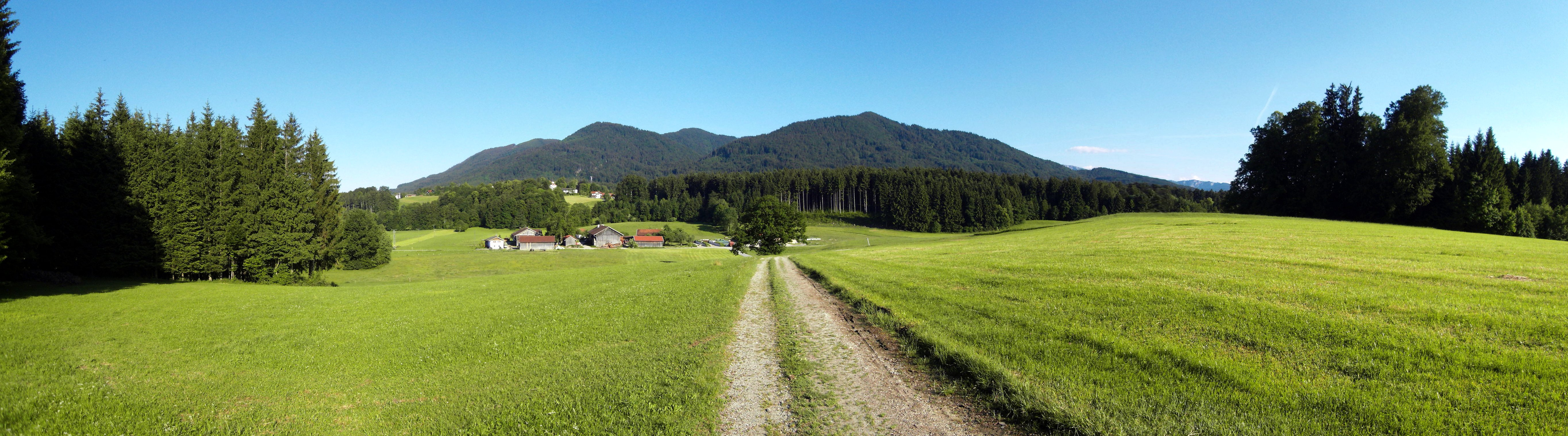 Schönau bei Bad Heilbrunn; Panorama